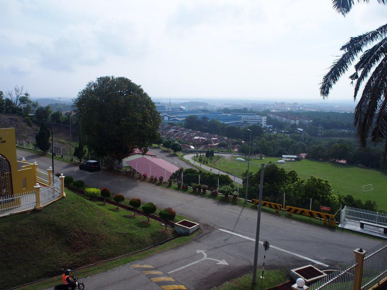 panorama sekolah